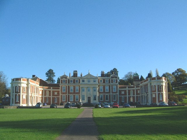 Hawkstone Hall